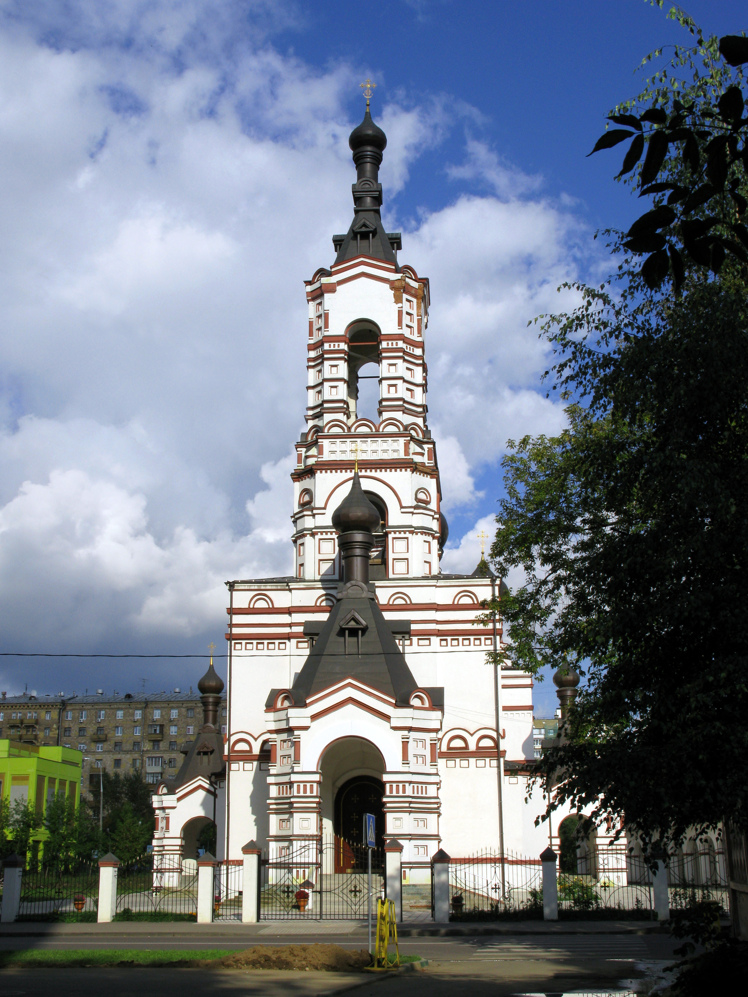 Храм Димитрия Солунского на Благуше